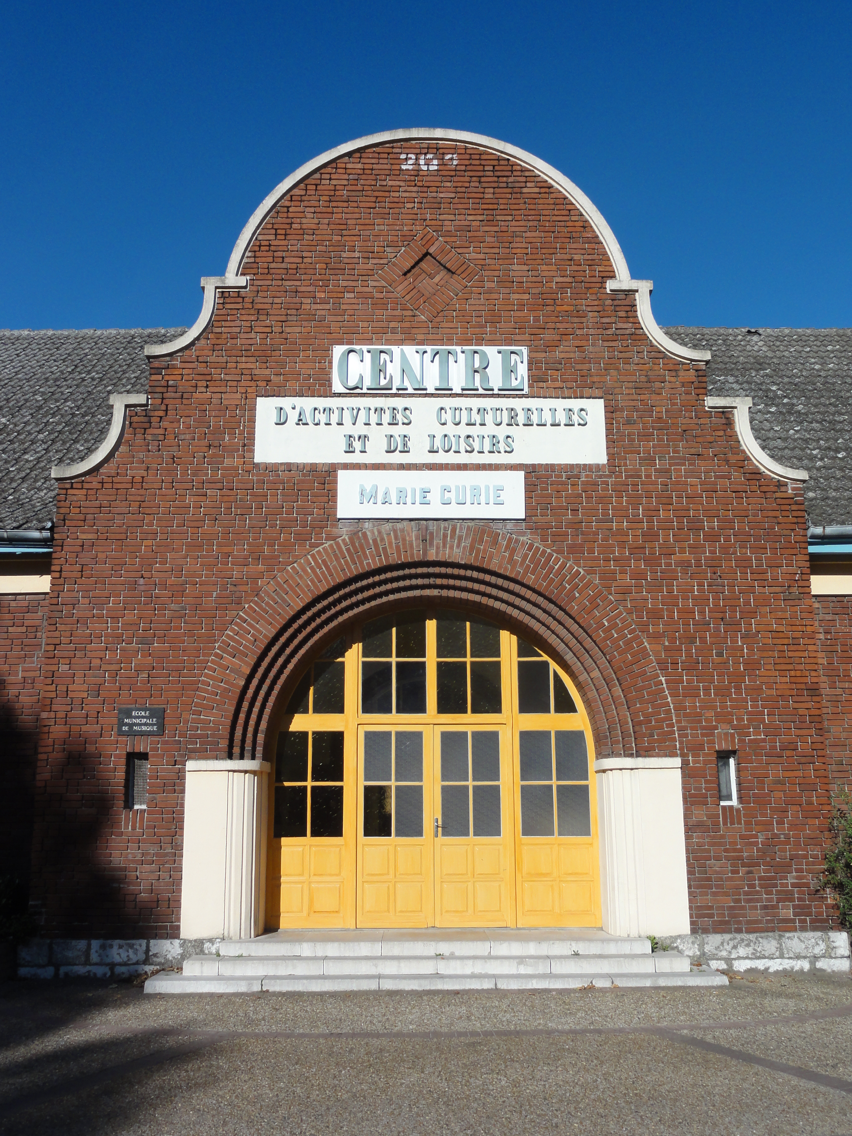 Écoles des cités de la Fosse n° 2 de la Compagnie des mines de Drocourt, Rouvroy, Pas-de-Calais, Nord-Pas-de-Calais, France. .